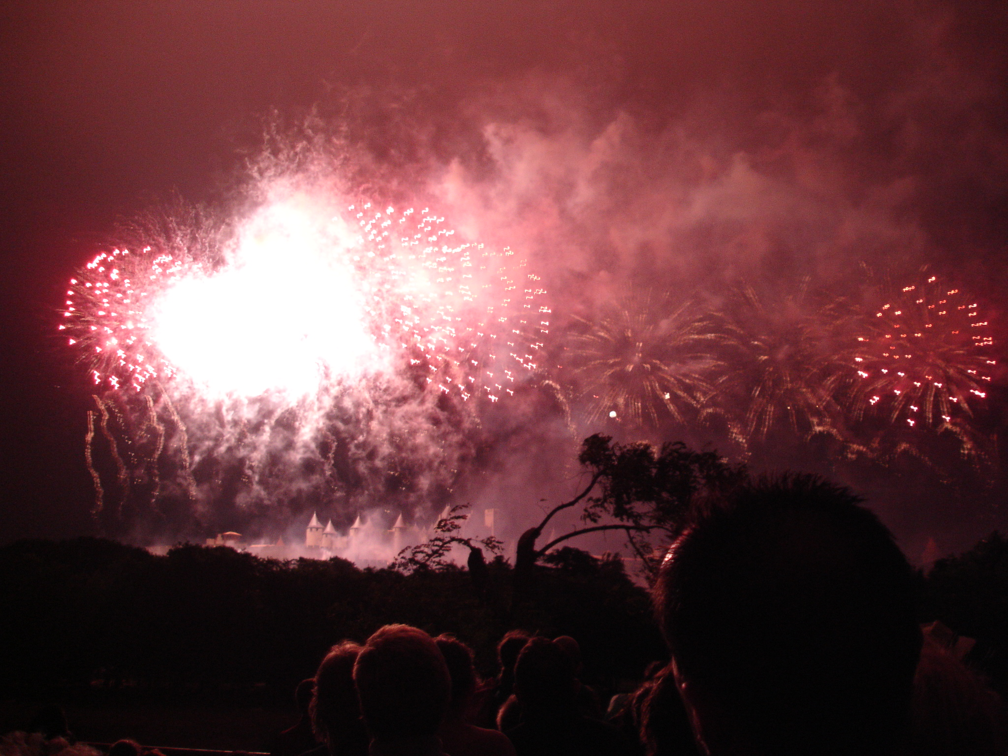 France, Aude (11), Carcassonne, embrasement de la cité au 14 julllet